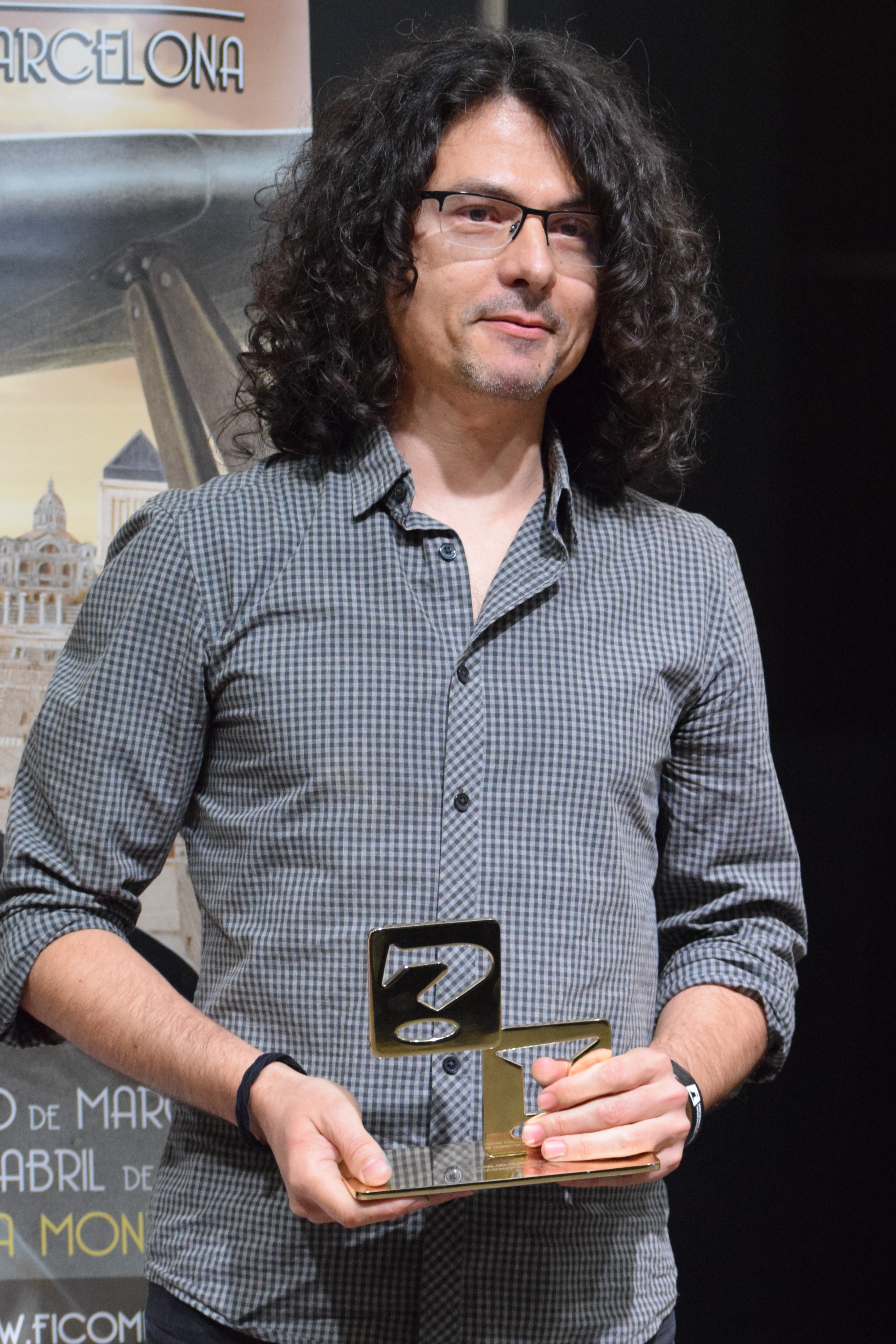 Jaime Martín després d'haver guanyat el premi a la millor obra pel còmic Jamais je n'aurai 20 ans (Jamás tendré 20 años). Saló Internacional del Còmic de Barcelona de 2017. Divendres 31 de març de 2017.